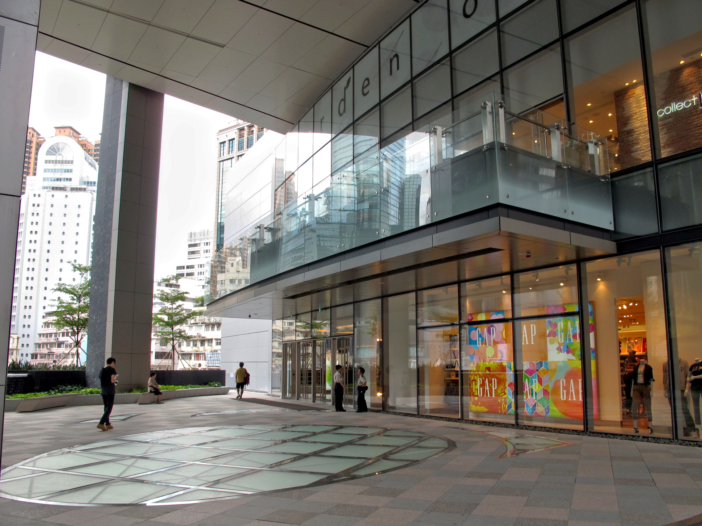 Hysan Place Level 4 Garden